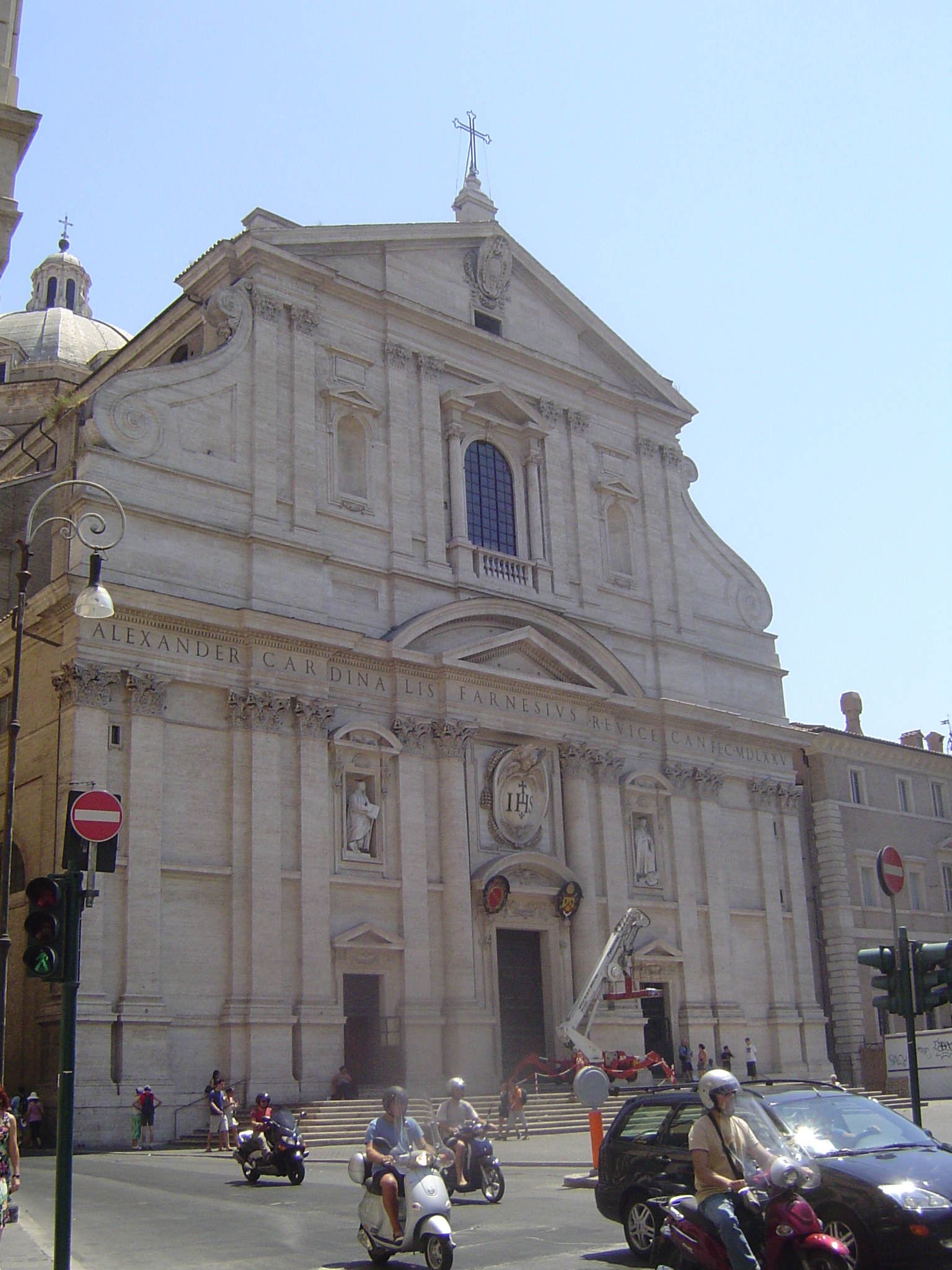 Roma, Italia